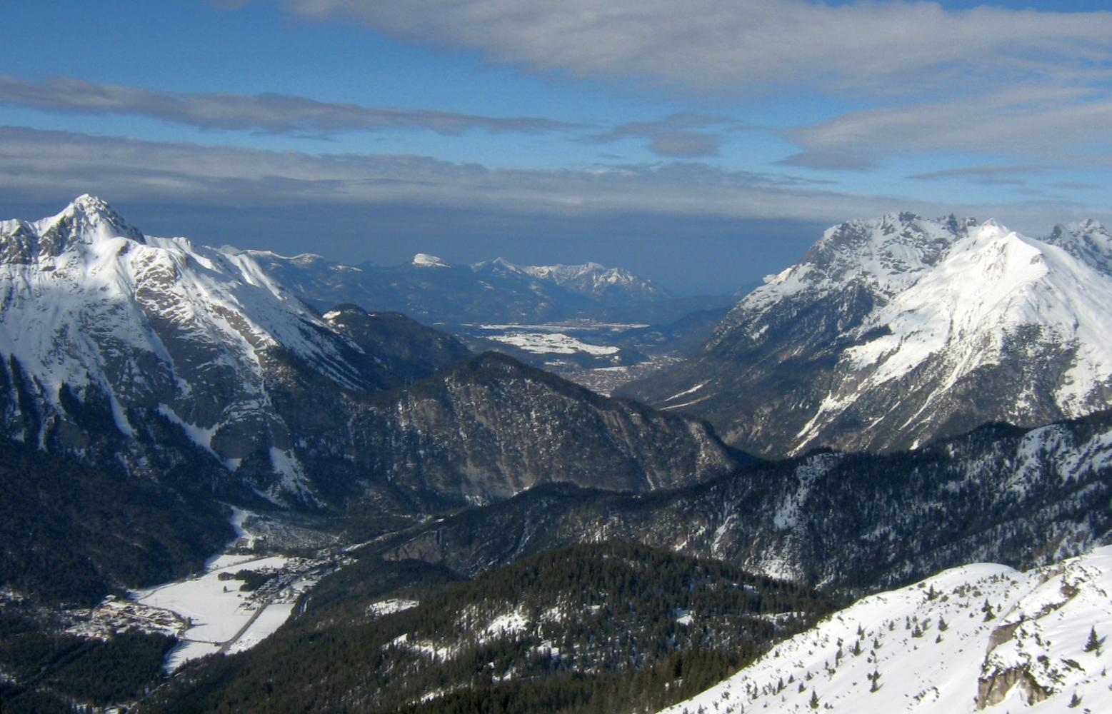 Scharnitzpass vom Seefelder Joch aus gesehen